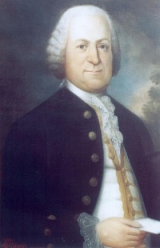 Anton Rindenschwender, Gaggenau Gemälde im Privatbesitz unserer Familie